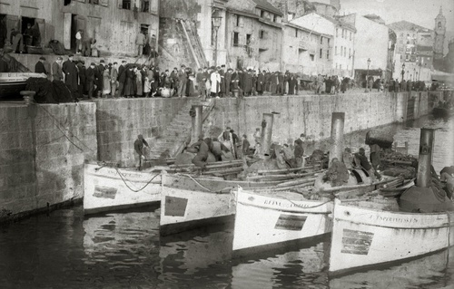 Baxurako baporeak Donostiako portuan. 1917 / 1918